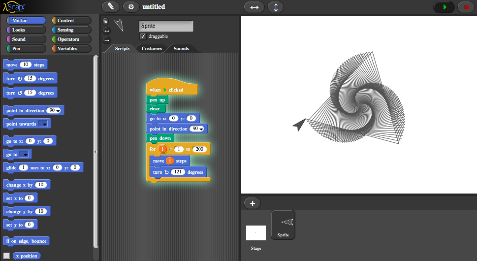 Snap_Entwicklungsumgung_Beispiel